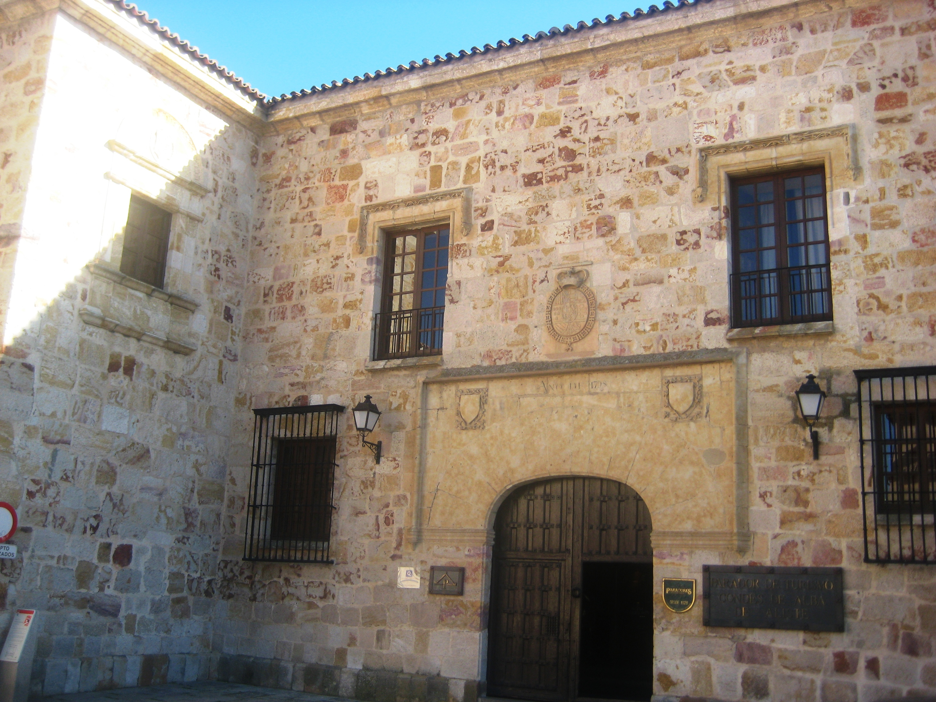 Palacio de los Condes de Alba y Aliste (Zamora).